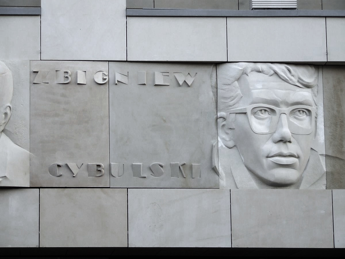 Zbigniew Cybulski 1927-1967, płaskorzeźba na Kinie Praha w Warszawie